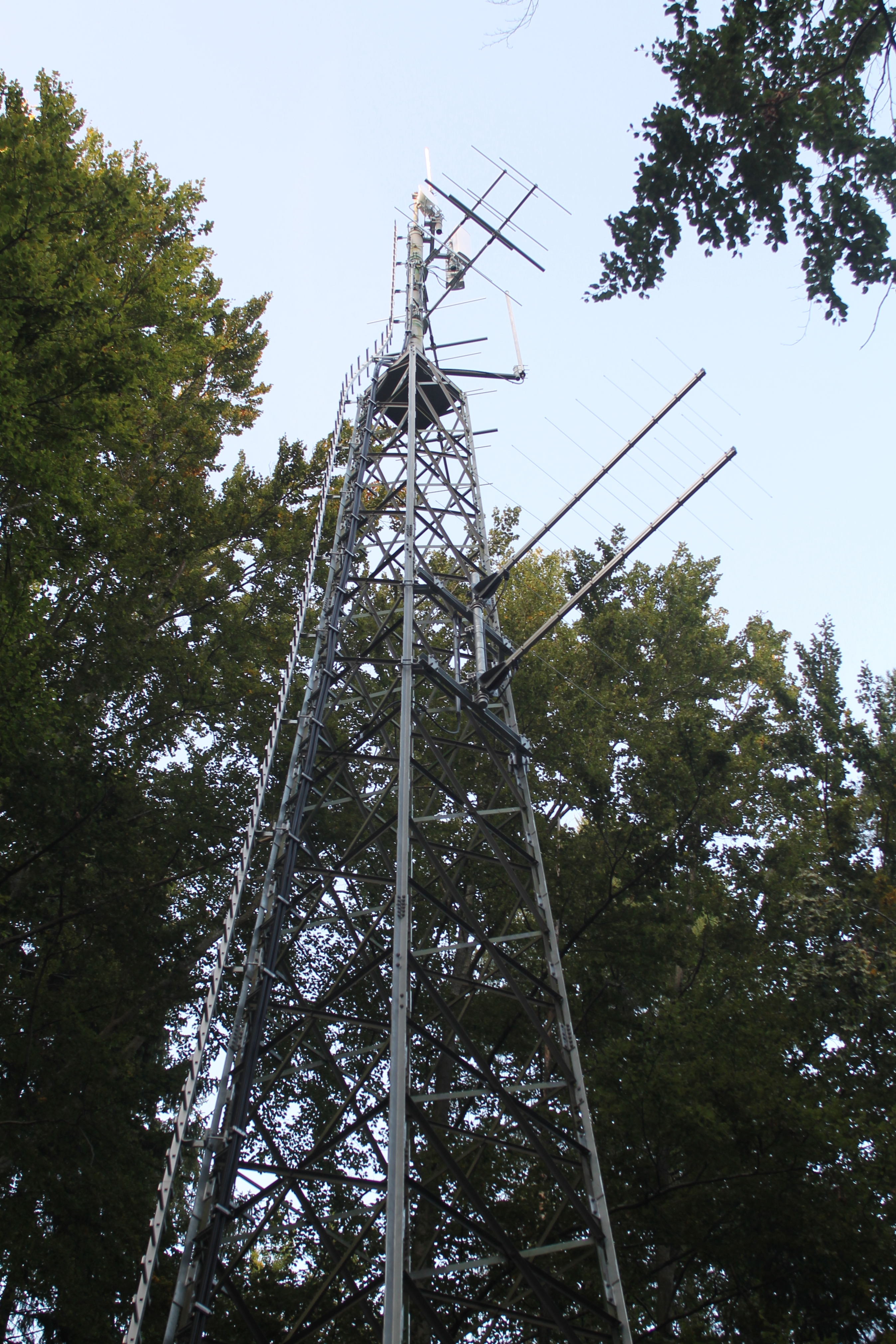 Sendeturm Nagoldtal - OpenStreetMap (Info)